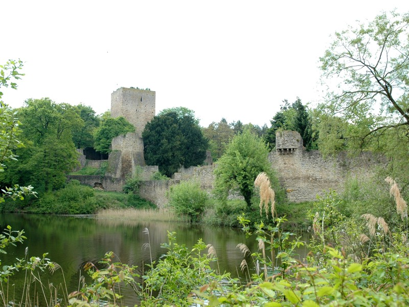 Die Hardtburg aus Nordosten